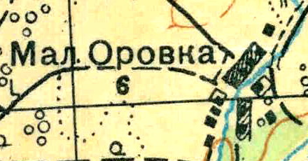 Топографическая карта Ленинградской области, квадрат О-36-13-А-а (Большая Пудость), деревня Малая Оровка